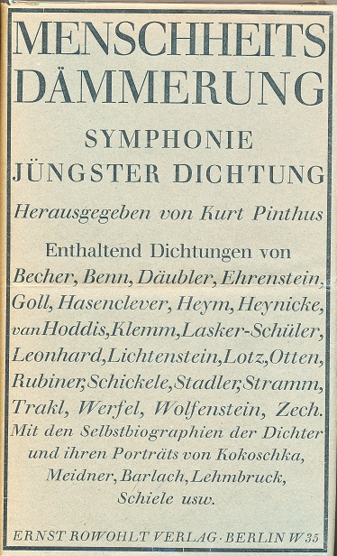 Menschheitsdämmerung. Symphonie jüngster Dichtung. Hrsg. von Kurt Pinthus, Berlin, Rowohlt 1920, 316 Seiten mit Gedichten von Gottfried Benn, Albert Ehrenstein, Yvan Goll, Jakob van Hoddis, Else Lasker-Schüler, August Stramm, Georg Trakl, Paul Zech und anderen